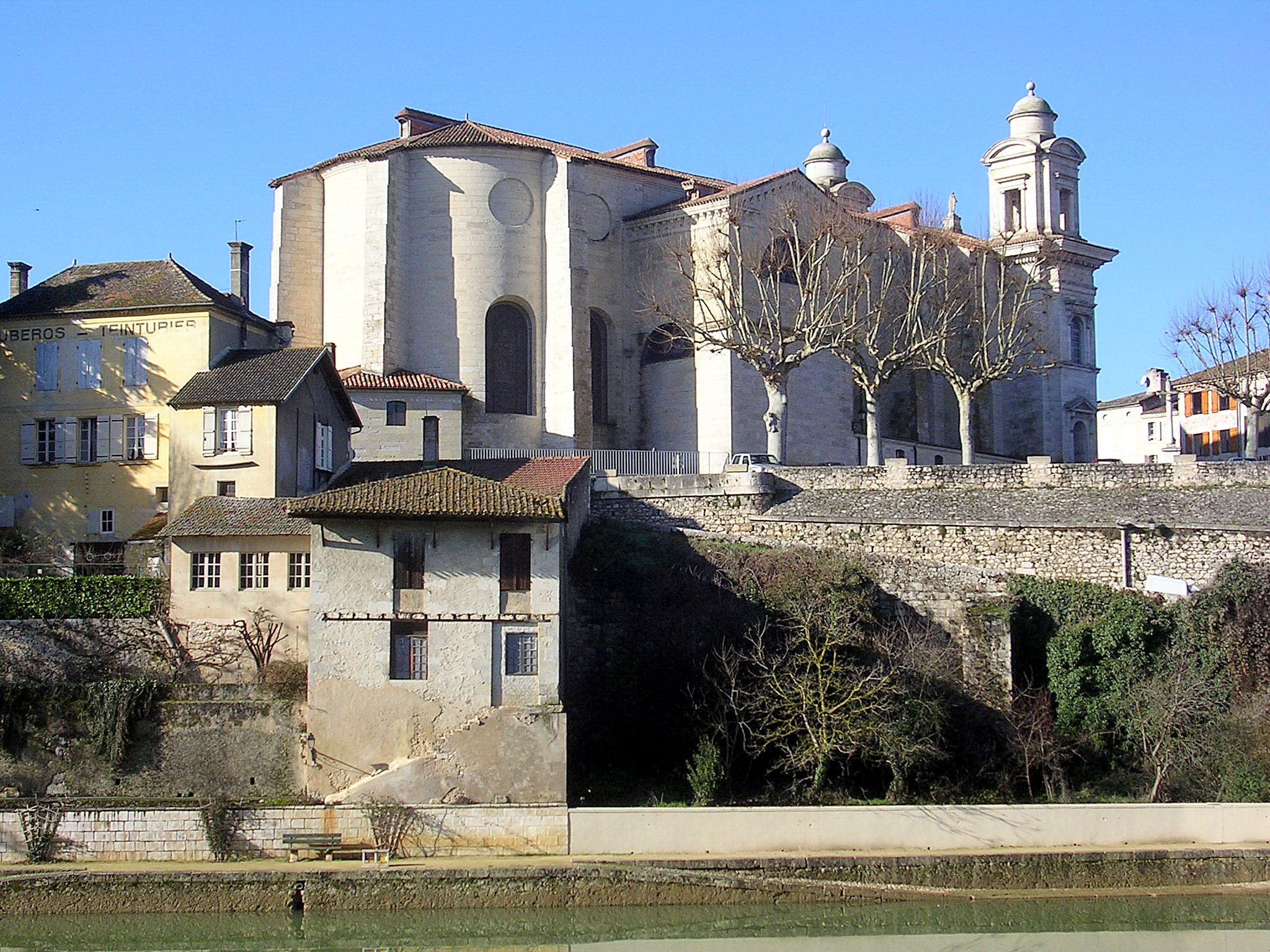 église saint Nicolas de Nérac (Lot-et-Garonne, France)